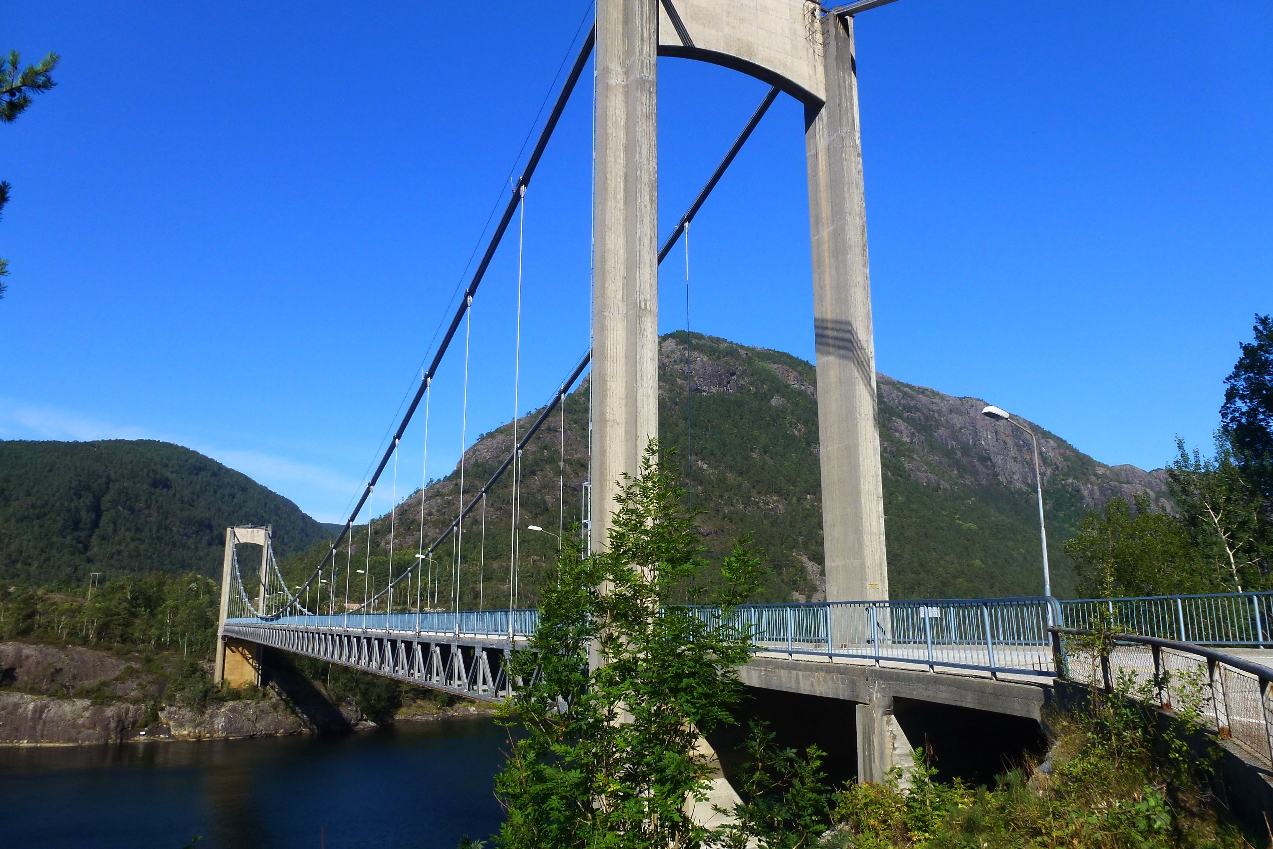 Suldal, Norway